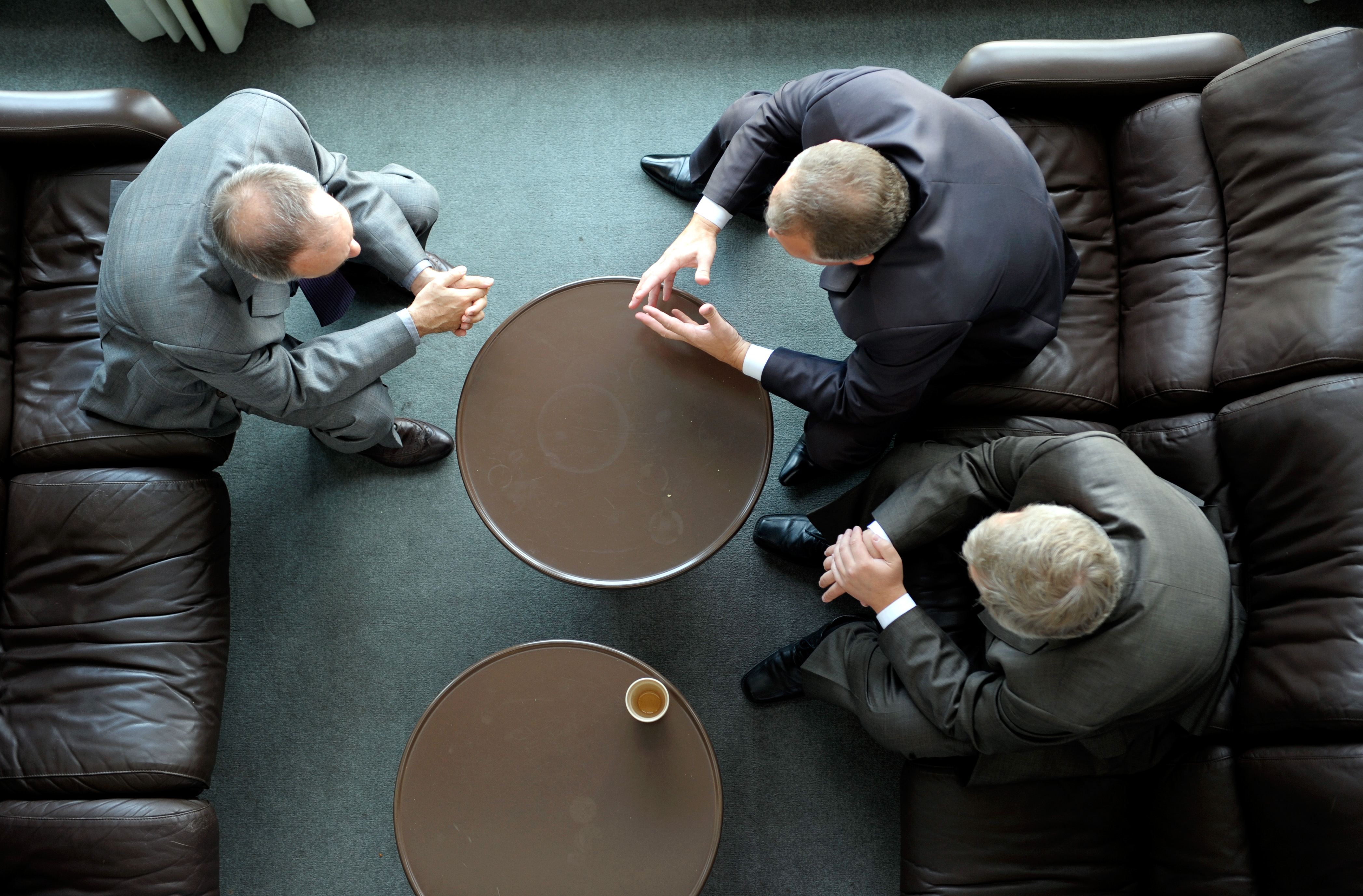 BSPC 19 Mariehamn Åland